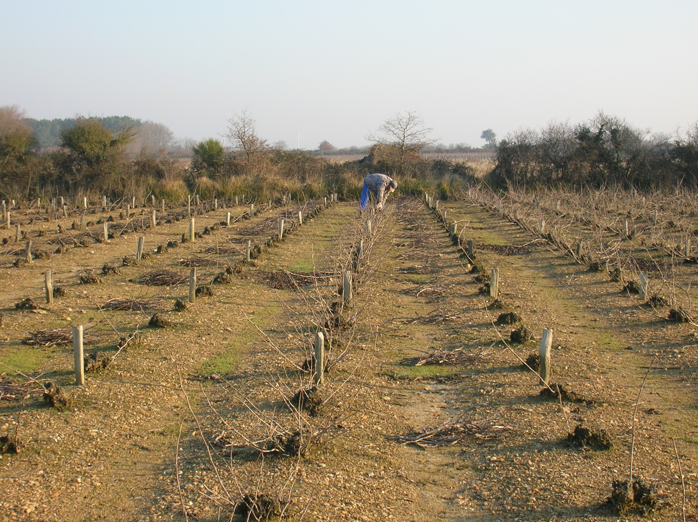 Une vigne basse